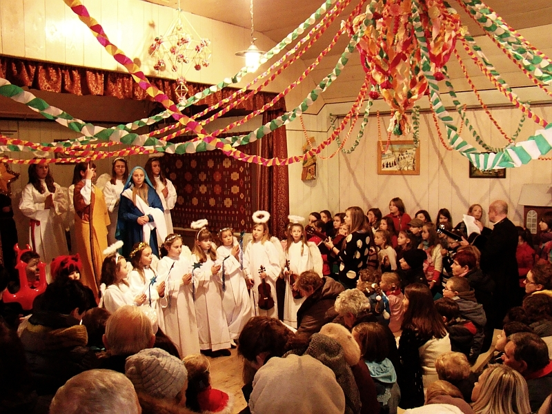 Himmeli Weihnachten Strohstern